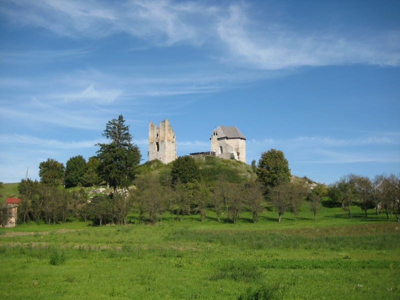 Sokolac, Brinje, Croatia